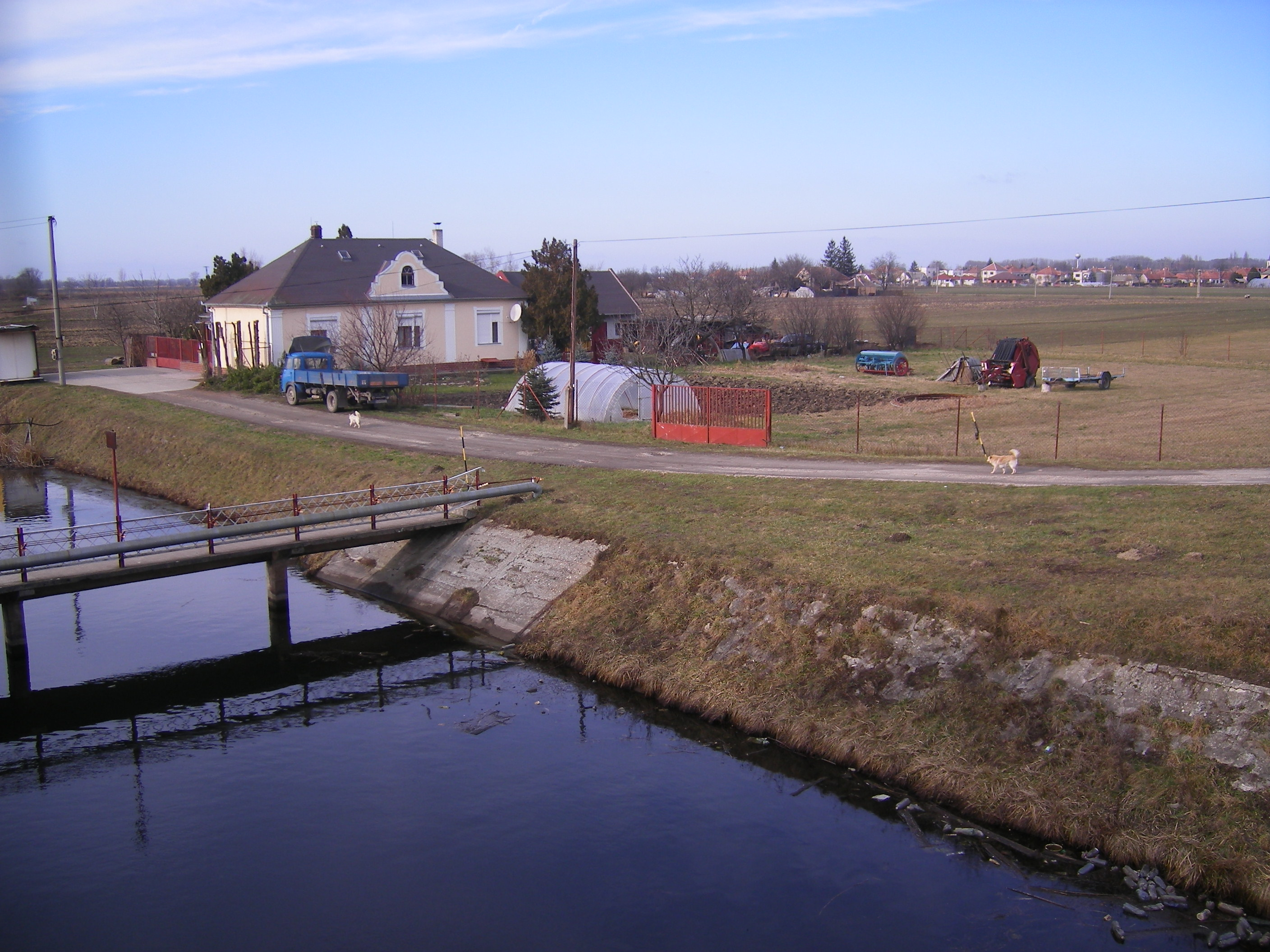 Keszegfalva - az egykori Vízvár helye a falu déli végénél